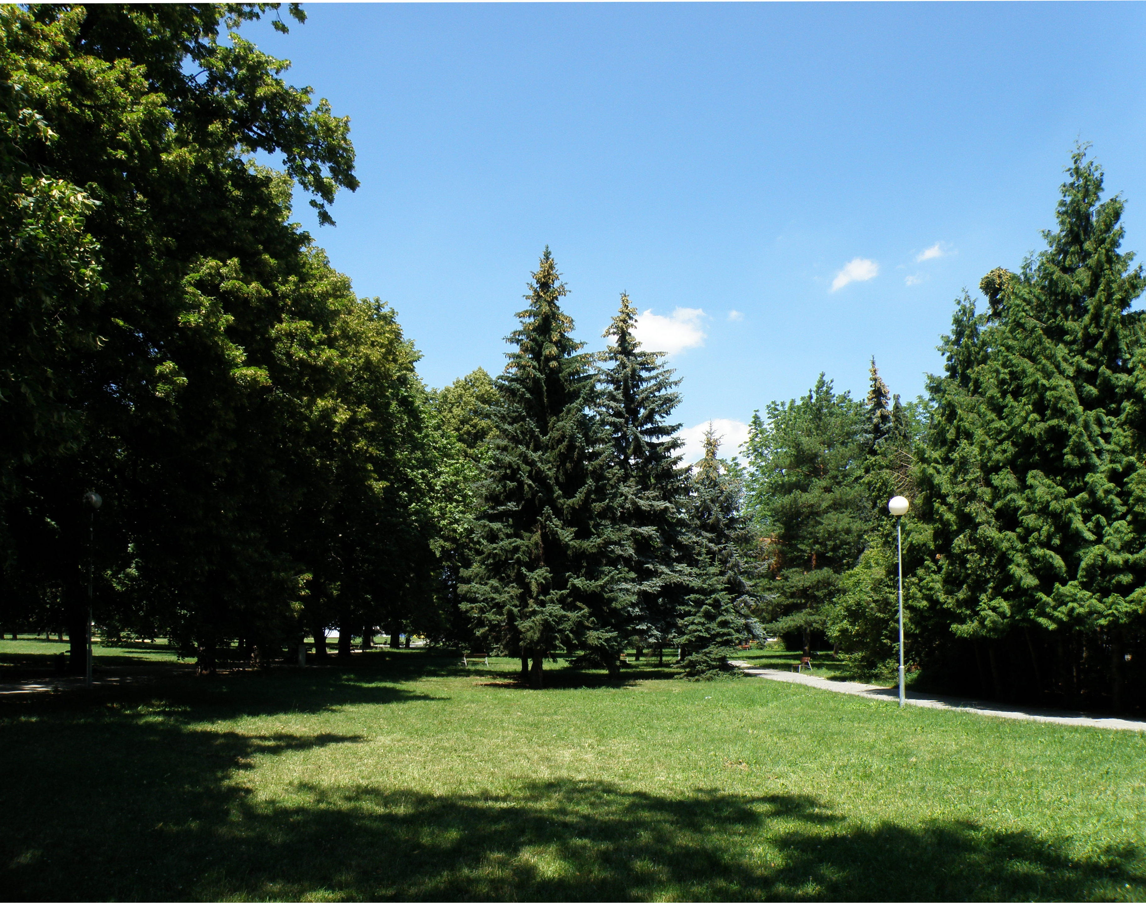 Pohled z travnaté plochy v jižní části Schreberových zahrádek směrem k severu.